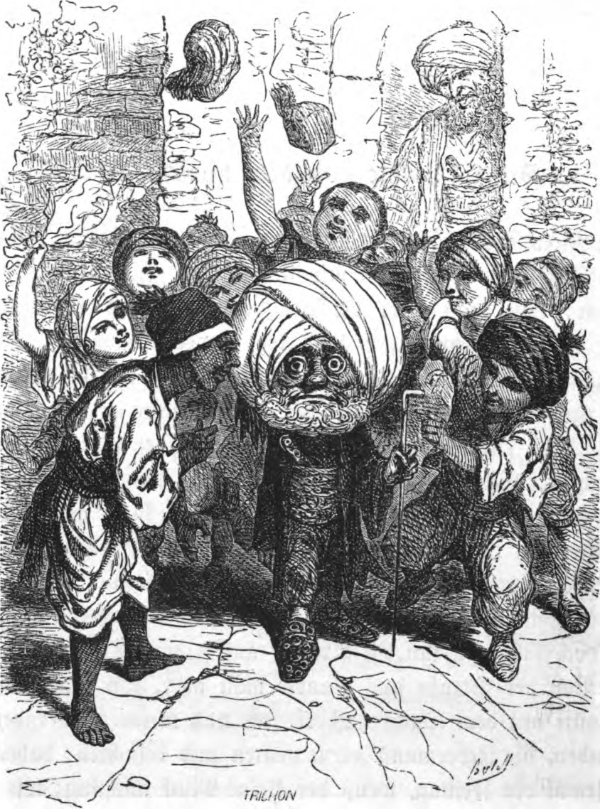 Szene aus Die Geschichte von dem kleinen Muck: Der alte Muck wird von Kindern verspottet